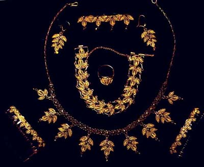 Bijoux offert lors d'un Grand mariage aux Comores. Licence GFDL. Scan par Vincnet G à partir d'une photo d'amateur libre de droit, par accord avec l'auteur. Licensing catégorie:Archipel des Comores